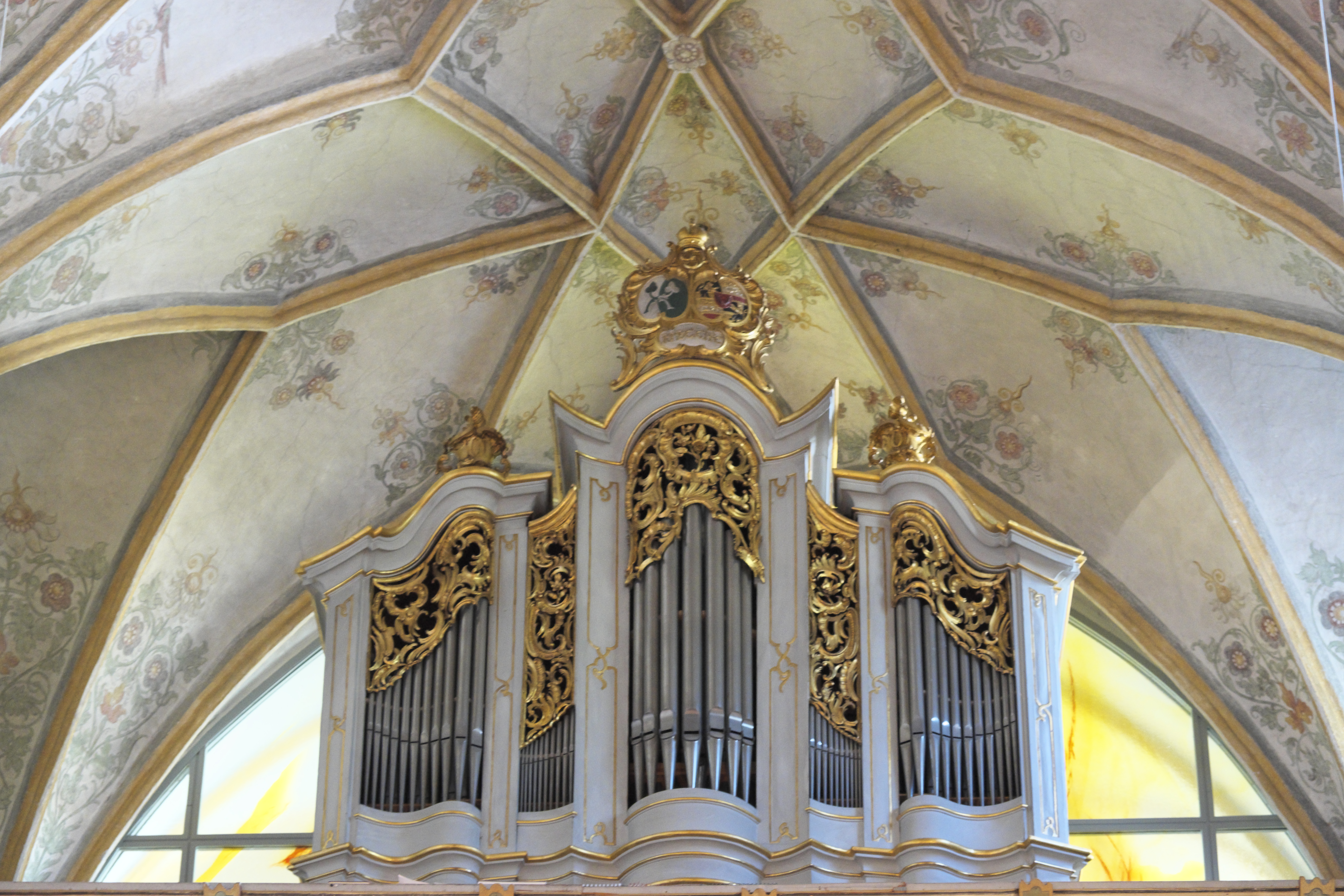 Katholische Abtei- und Kuratiekirche Mariä Opferung des Benediktinerinnenklosters Frauenchiemsee auf der Fraueninsel im Landkreis Rosenheim (Bayern/Deutschland), Orgel der Firma Orgelbau Sandtner